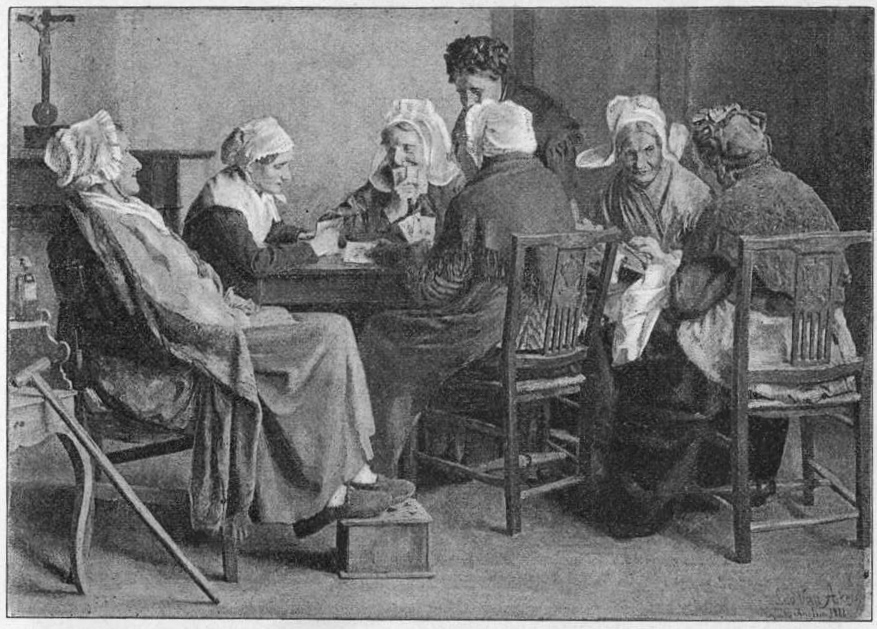 Im Altfrauenhause